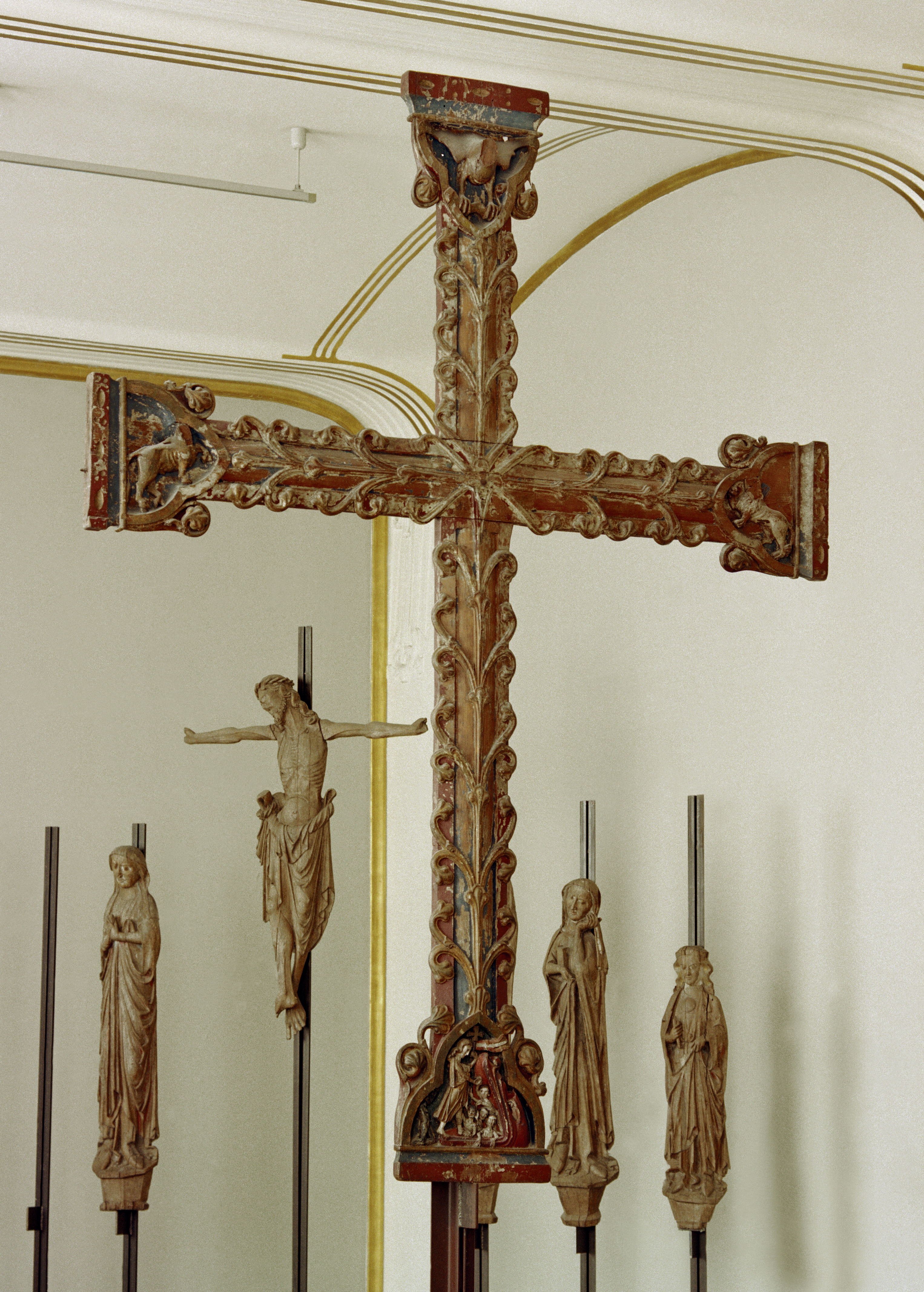 Foto av «Borrekorset» fra kopiert fra Universitetesmuseenes fotoportal på unimus.no der bildet har følgende beskrivelse: Emneord: The Medieval Sculpture Collection Motiv: Krusifiks av tre (furu). Kors, kristusfiguren mangler. Korset er dekket av vinranker. Korsarmene er dekorert med treflikede medaljonger. De tre øverste inneholder utskjærte symbolder for evangelistene, det nederste viser Kristus i limbus. Korset har ingen naglehull etter en festet kristusfigur. Gjenstand: krusifiks Tid/Periode: Middelalder Sted: Norge, Vestfold, HORTEN, BORRE PRESTEGÅRD, 15 Fotograf: Ukjent Bestillingsnr: Cf25878_04_C6130 Museumsnummer: C6130 Lisens: CC BY-SA 4.0 Lokalitet ("lokid" i Askeladden):75510